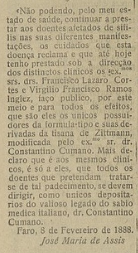 Efeméride publicada no n.º 1244 de 7 de Fevereiro de 1932